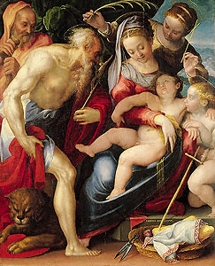 Prospero Fontana – Die Heilige Familie / Holy Family with St Jerome, a female martyr and the infant St John the Baptist / La Sainte famille avec saint Jérôme, une martyr et saint Jean Baptiste enfant